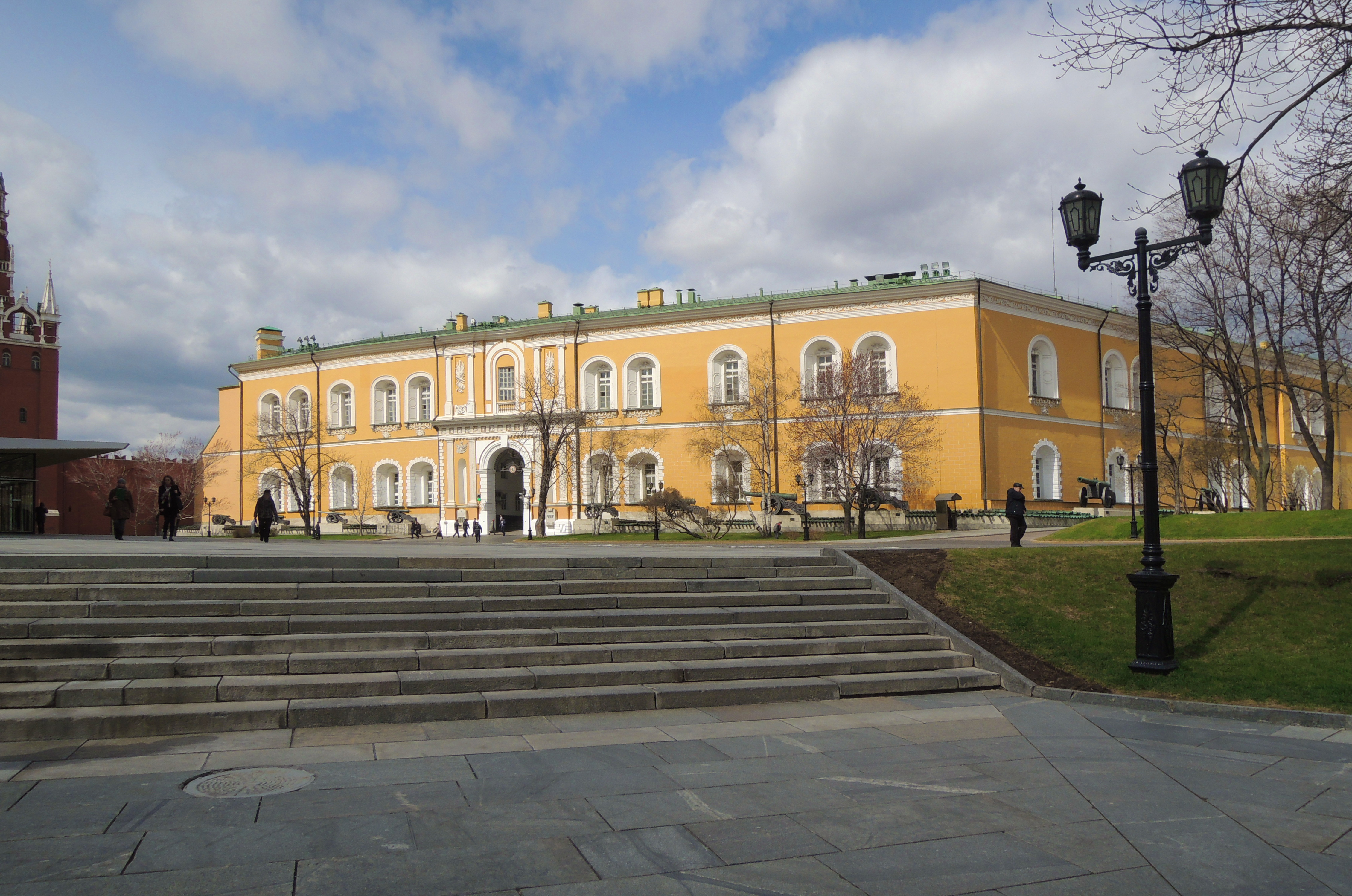 Kremlin Arsenal